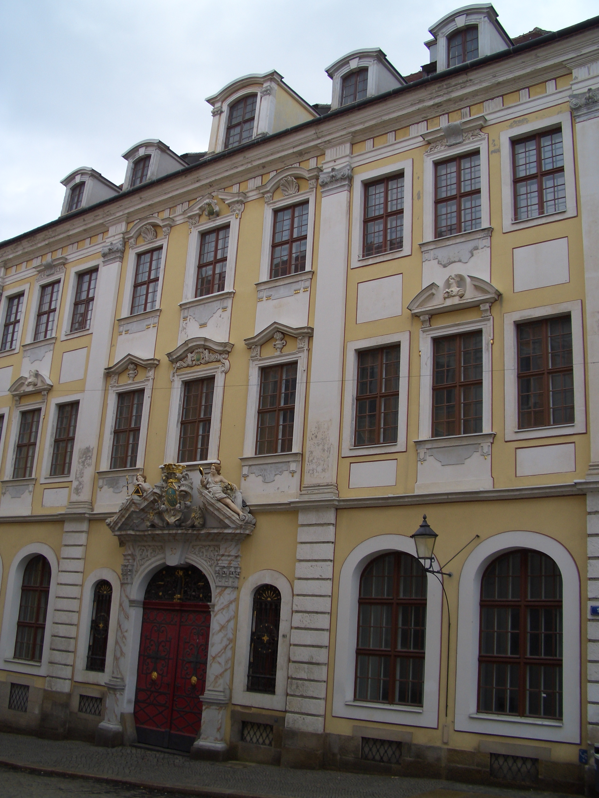 Oberlausitzische Gesellschaft der Wissenschaften, Neißstraße 30, Görlitz.